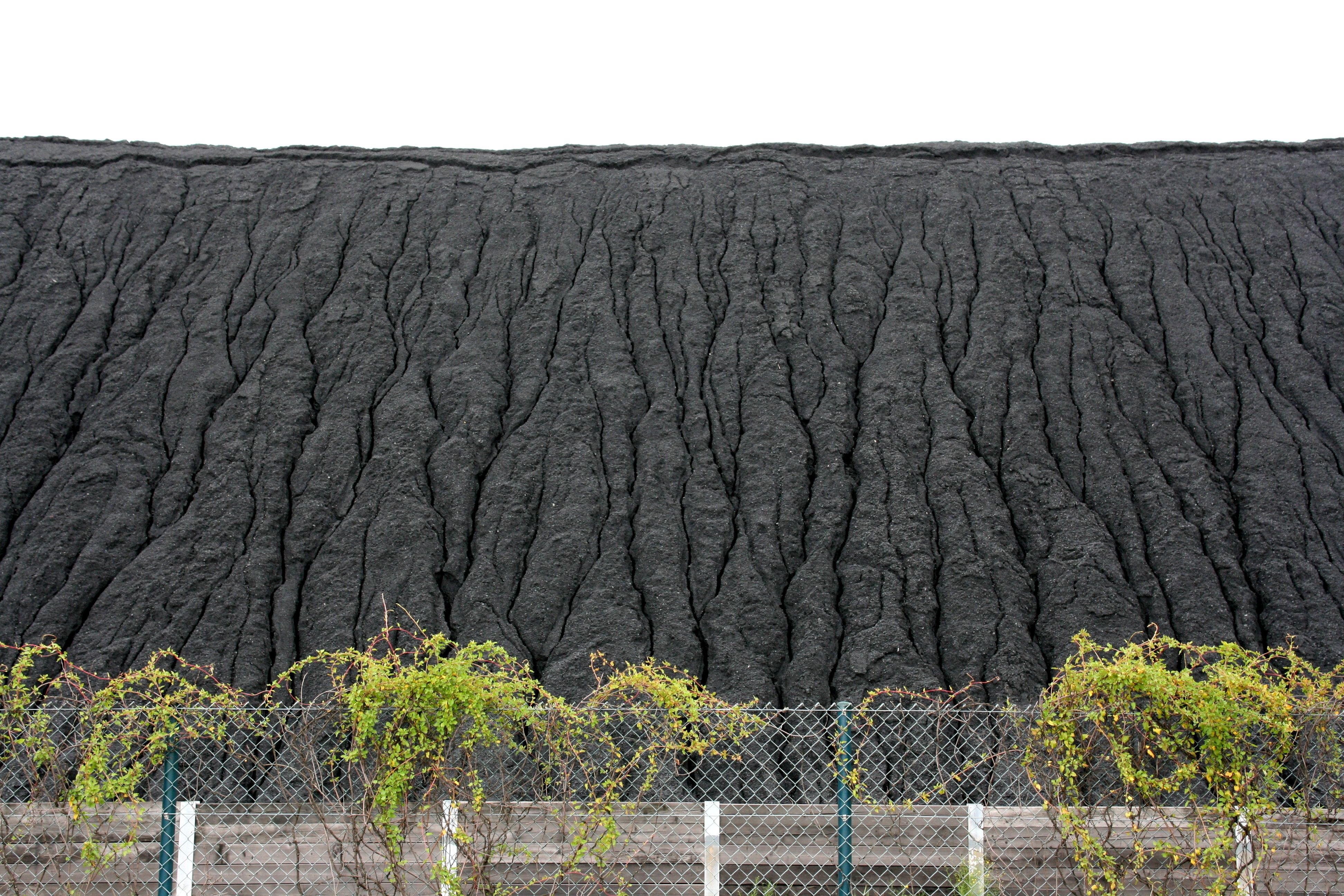 Am Westhafen in Herne